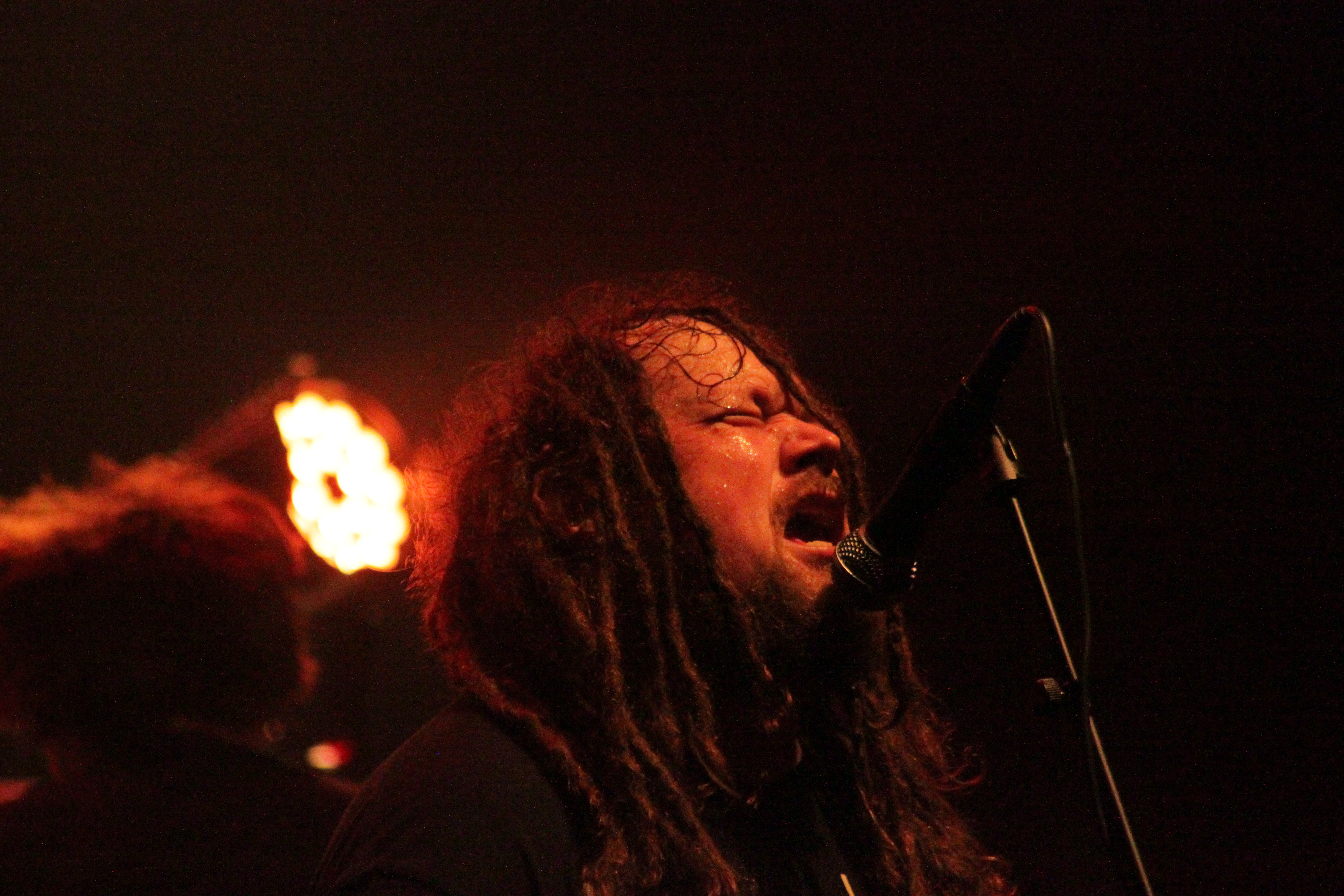 John Cooke, Napalm Death au Muscadeath XV, Fr-44-Vallet